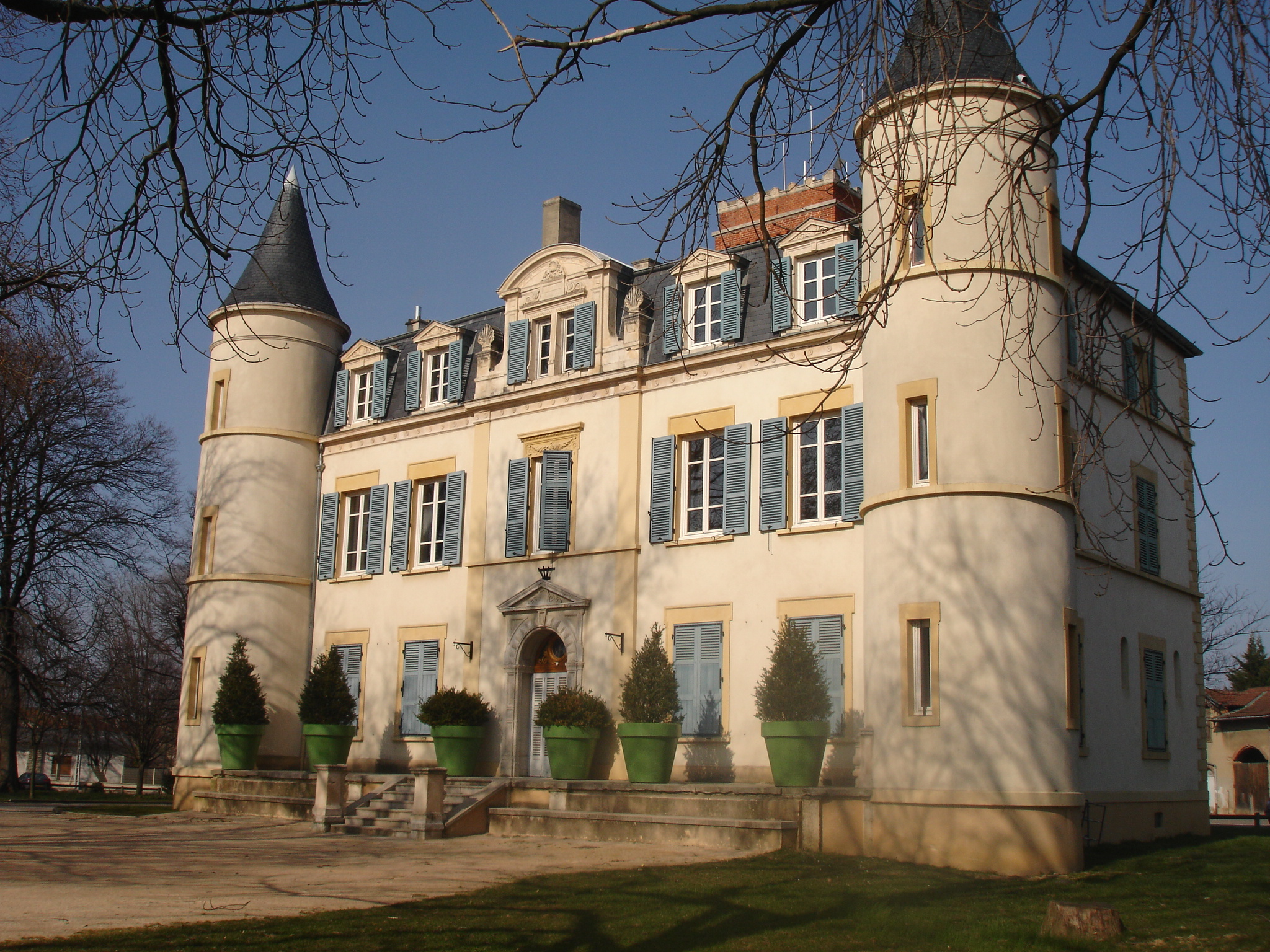 Feyzin (69) : le "château" vu du parc